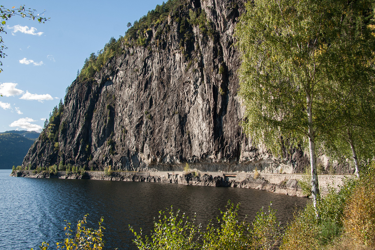 Fånefjell halvtunnel fra 1923. Langs Byglandsfjorden i Setesdal.